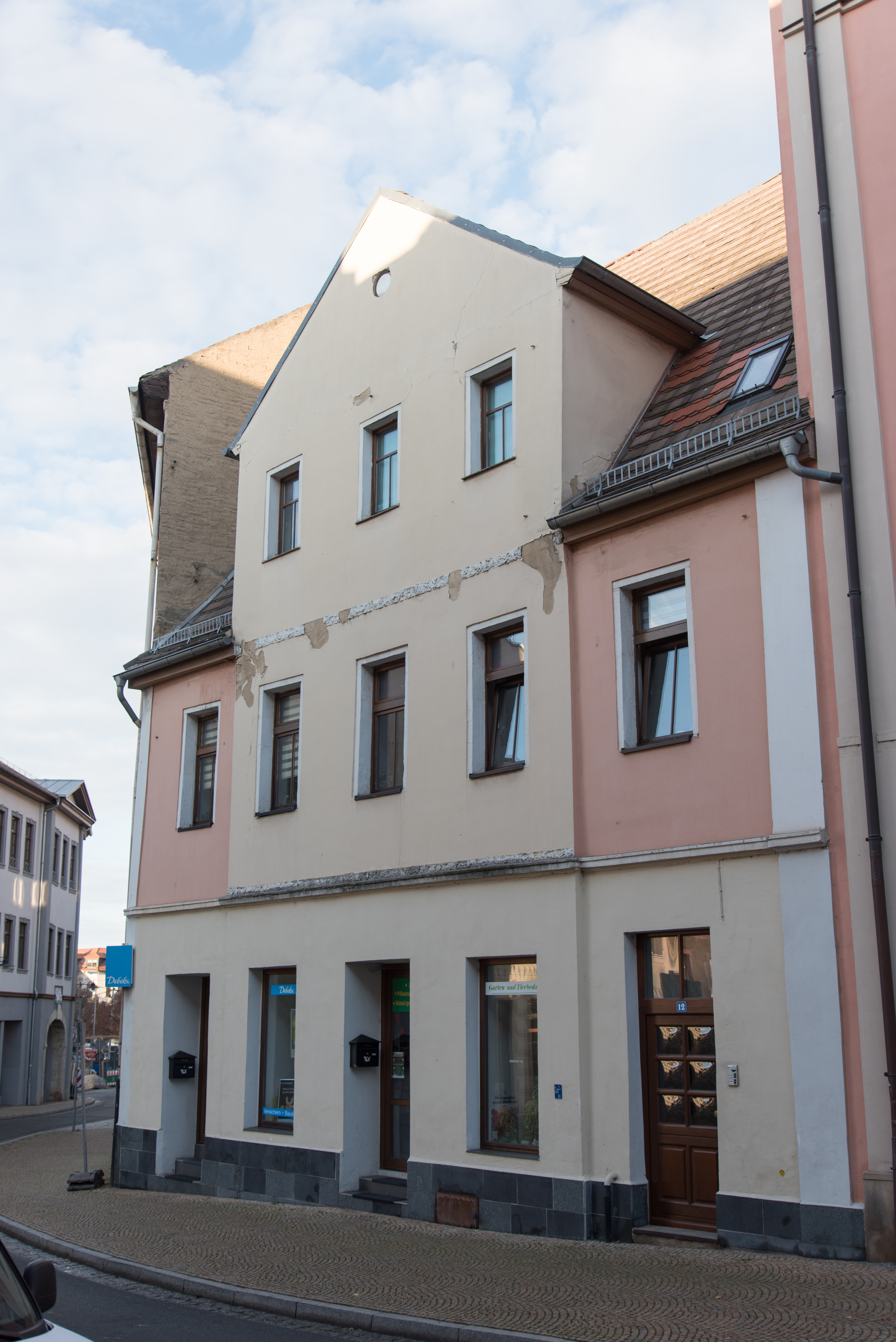 Weißenfels, Große Burggasse 12